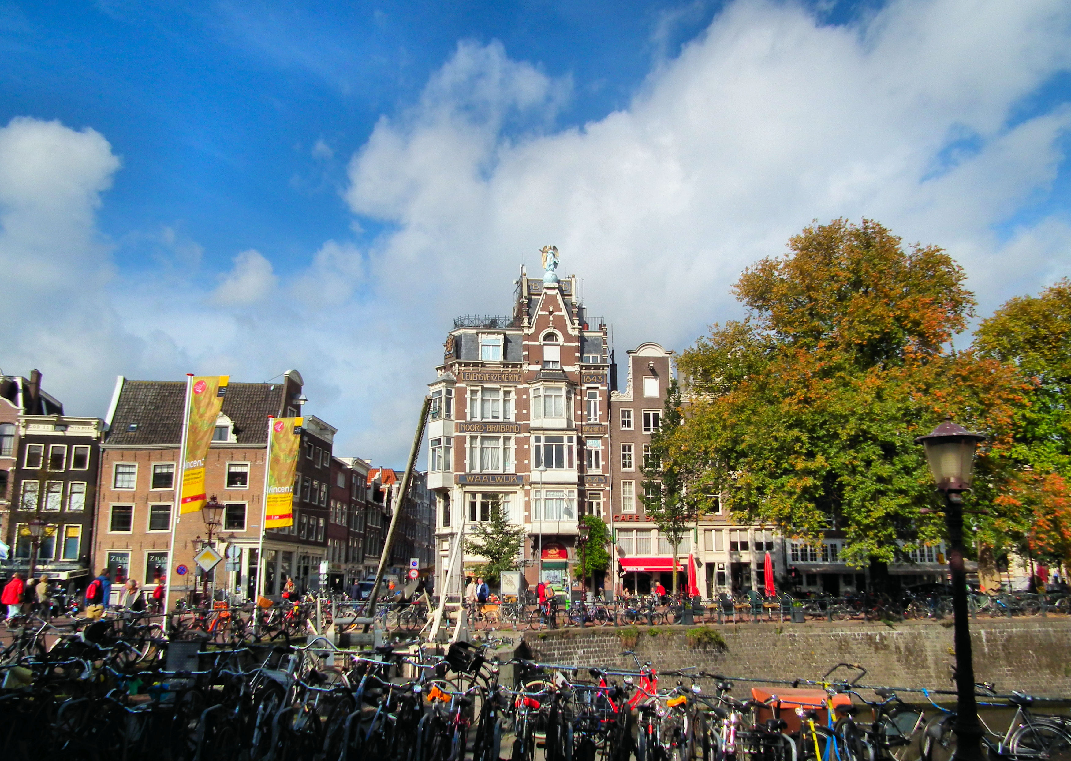 Singel, gezien vanaf brug Brouwersgracht. Op de achterghrond de Nieuwendijk. Op het hoekpand de tekst: "Levensverzekering Noord-Brabant 1843"